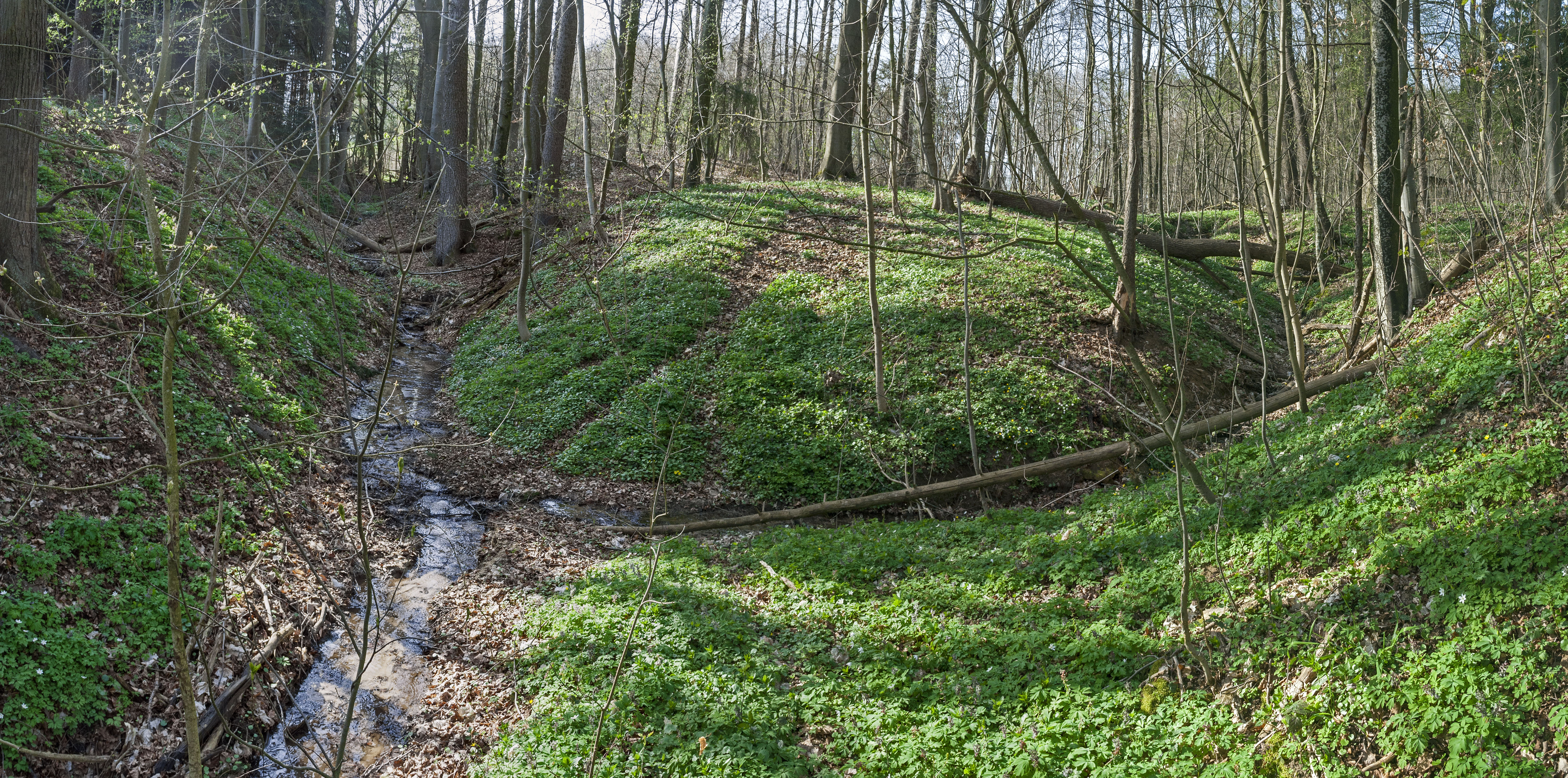 Wolfsschlucht, Geotop, LSG Schwarzachtal mit Nebentälern, Räthsandsteinschlucht, Quellgebiet